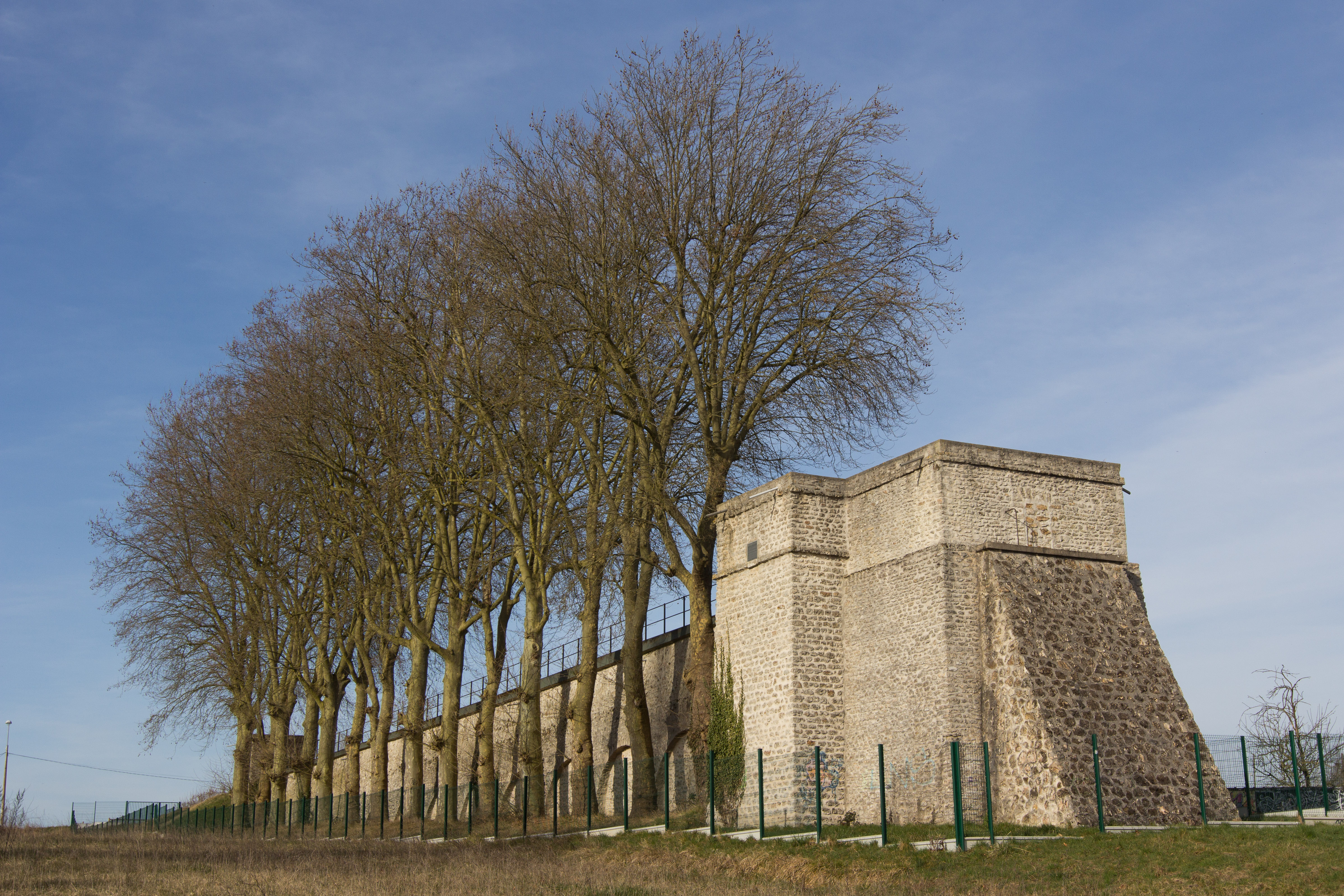 L'aqueduc de la Vanne à Villabé - Siphon au dessus de l'Essonne / Villabé / Essonne / France